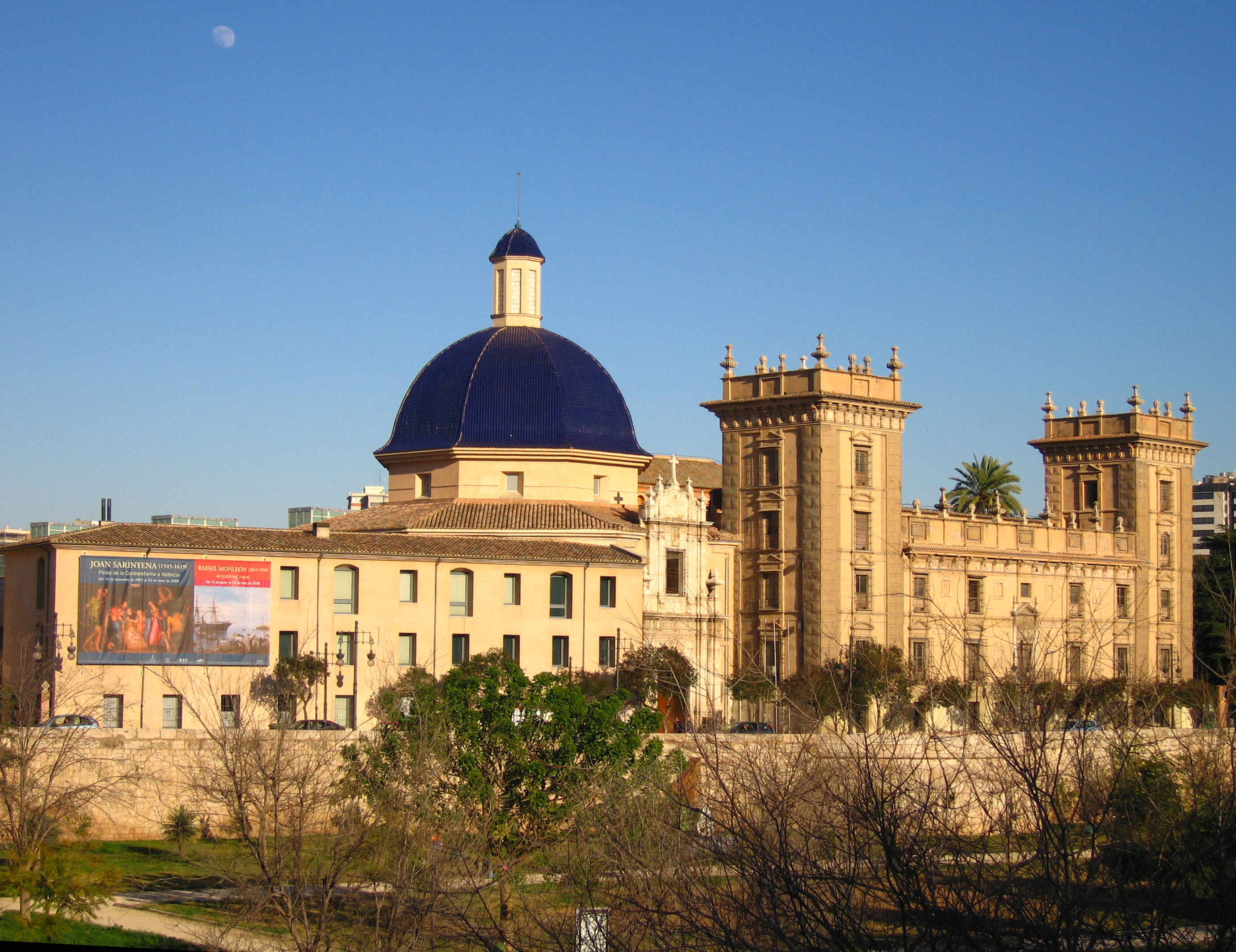 Vista del Museu de Belles Arts de València